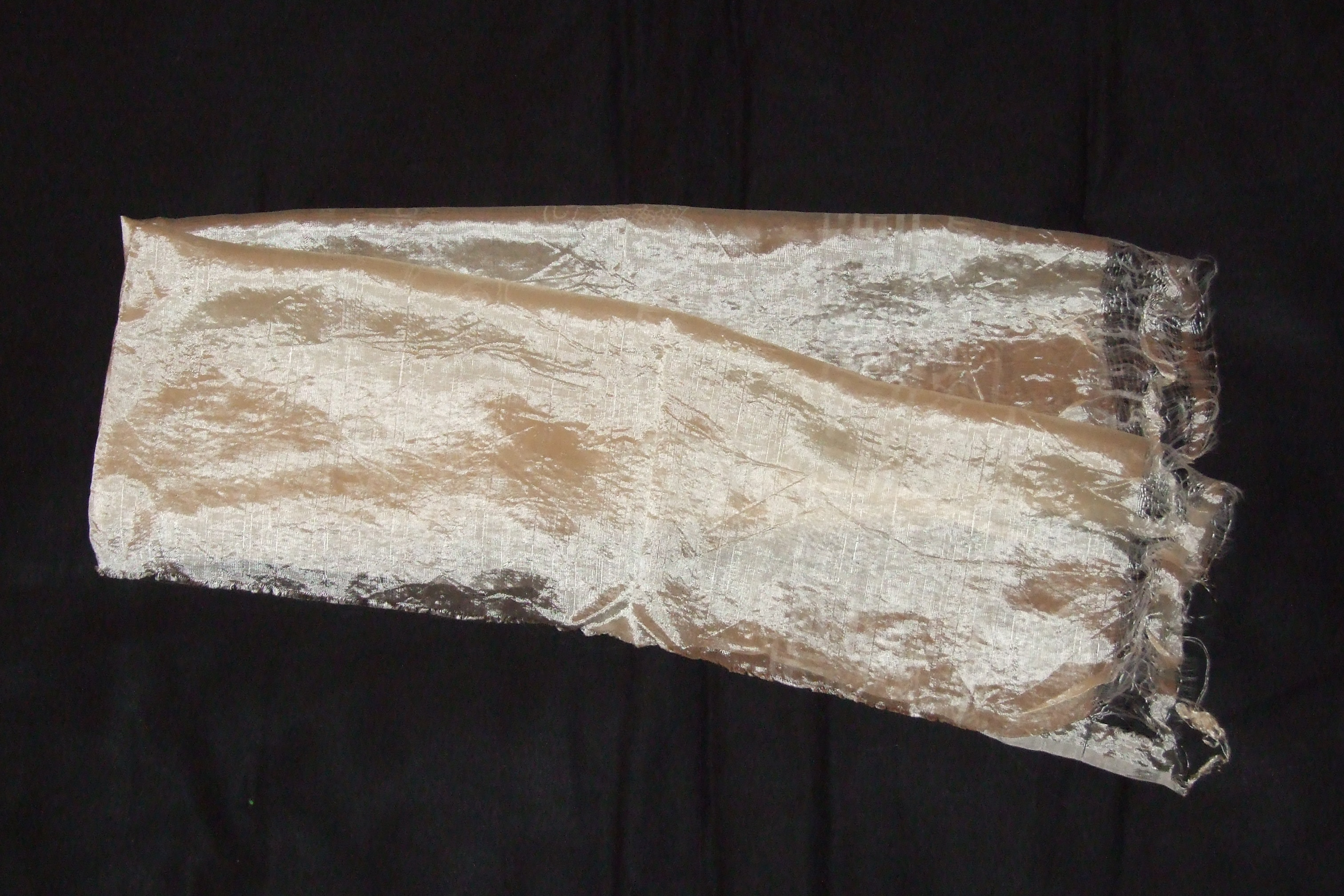 A khata from Sikkim, India.